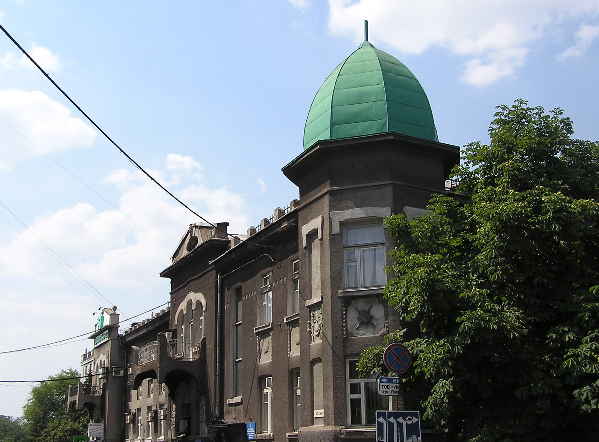 Донецк. Дом Горелика Дом Горелика